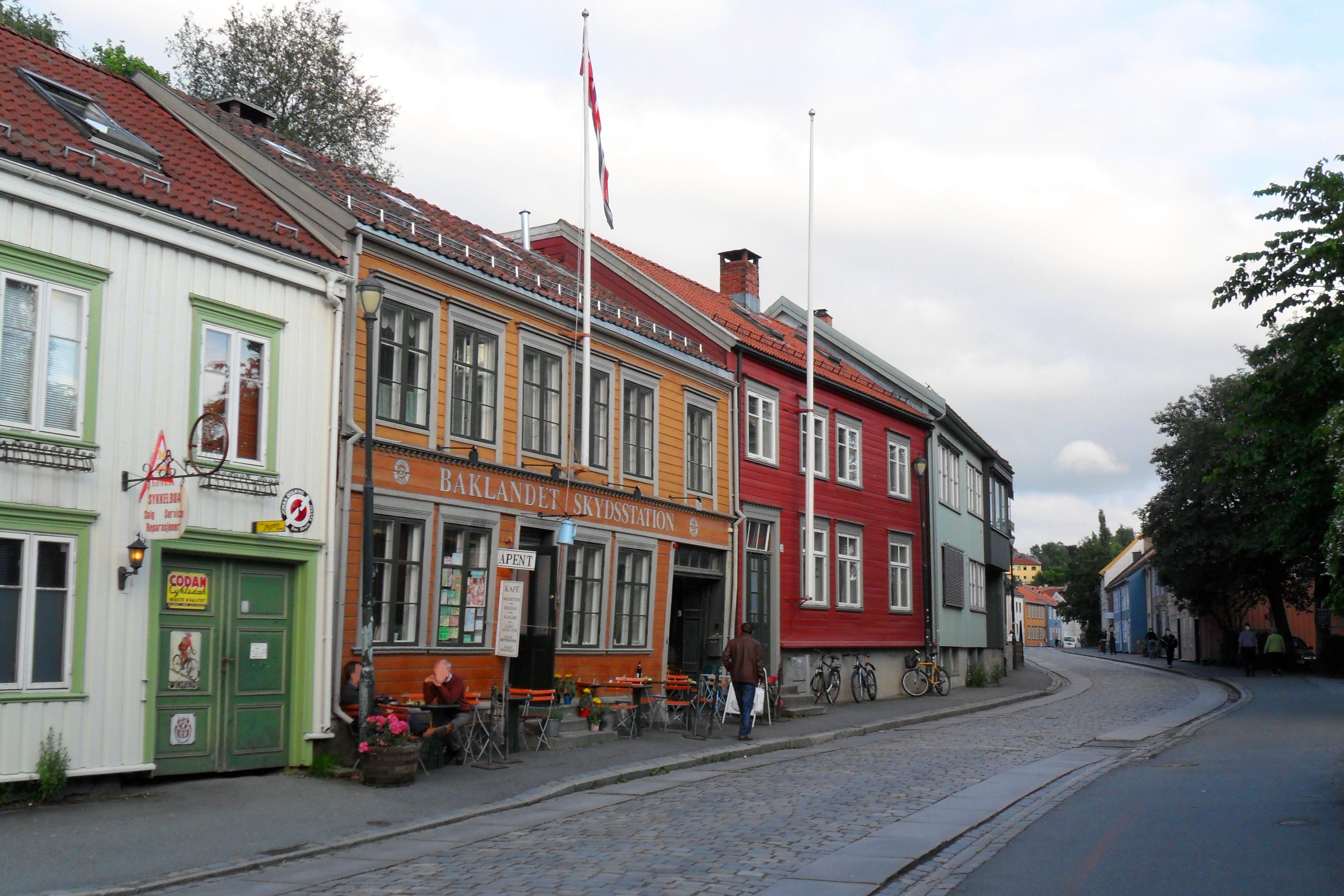 Baklandet Skydsstation - Øvre Bakklandet 33 1700-tallet, fjerde kvartal Trondheim ld: 117806